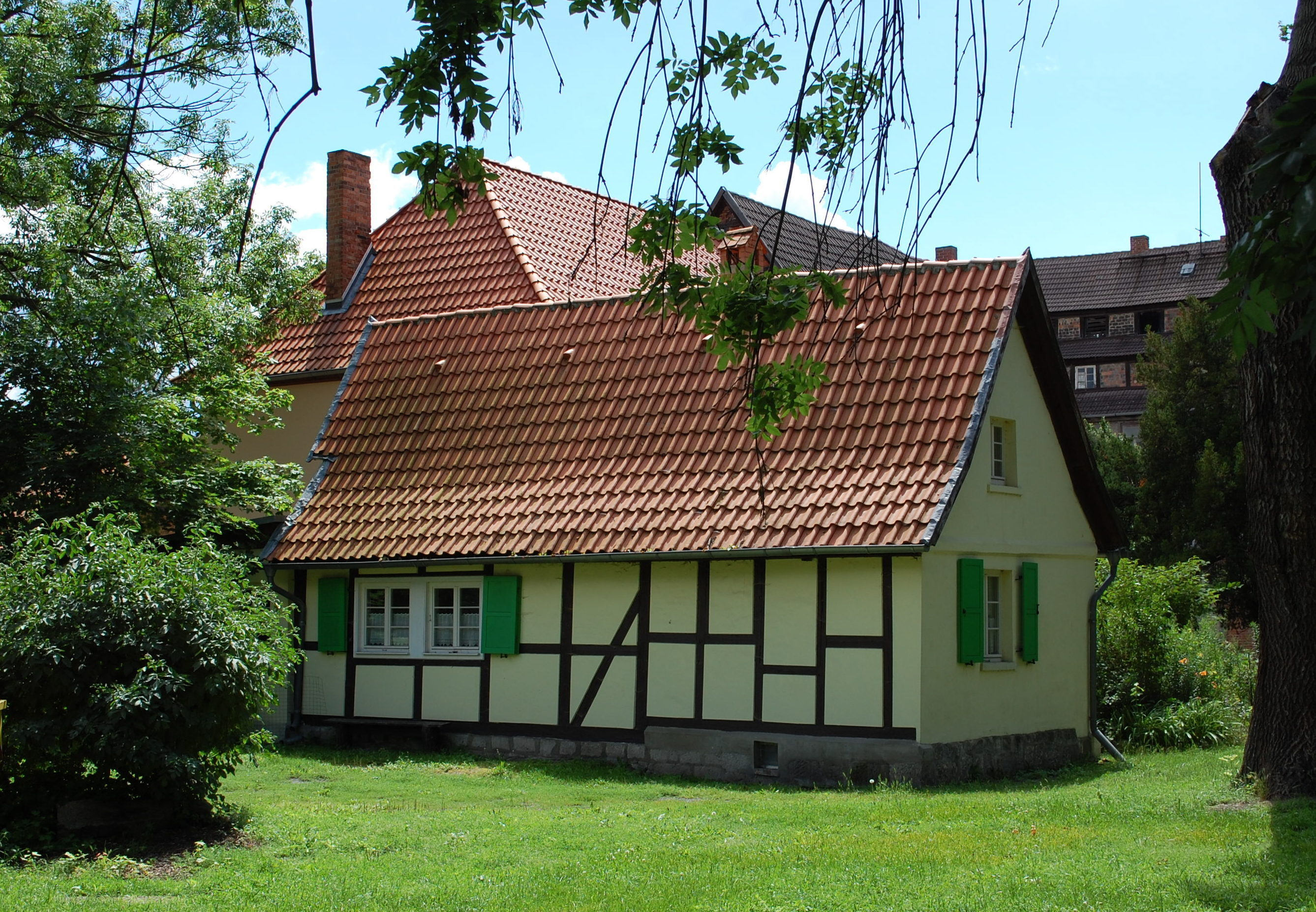 Haus am Grundstück Ägidiikirchhof 3 in Quedlinburg